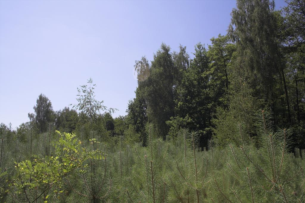 Polana w Emilcinie - widok od strony północnej na miejsce, gdzie unosił się statek UFO.